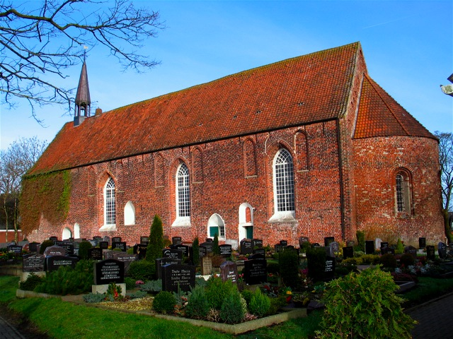 Die Kirche von Groß-Midlum mit umliegendem Friedhof